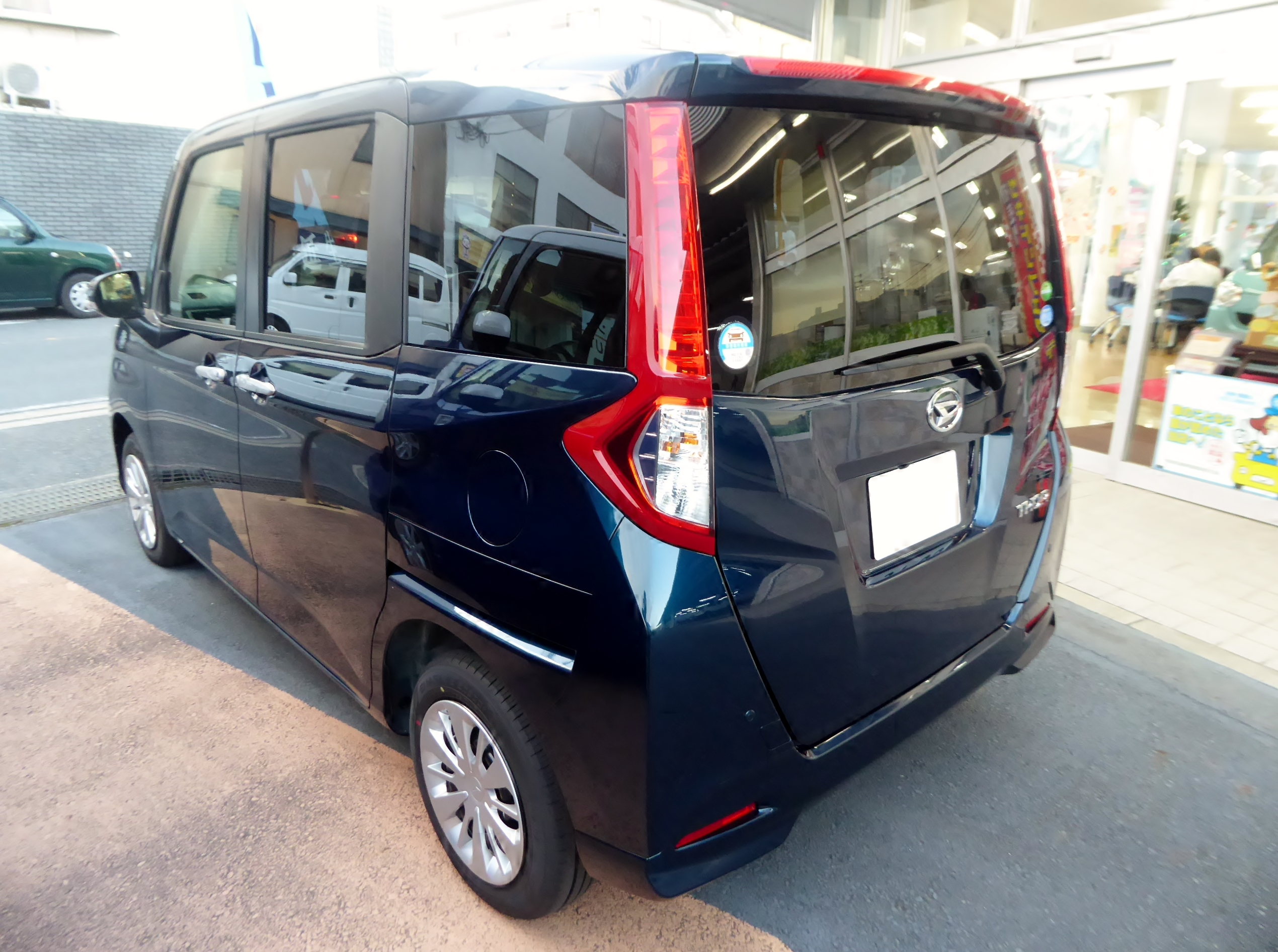 DBA-M900S型ダイハツ・トールG"SA II"をリアから撮影。